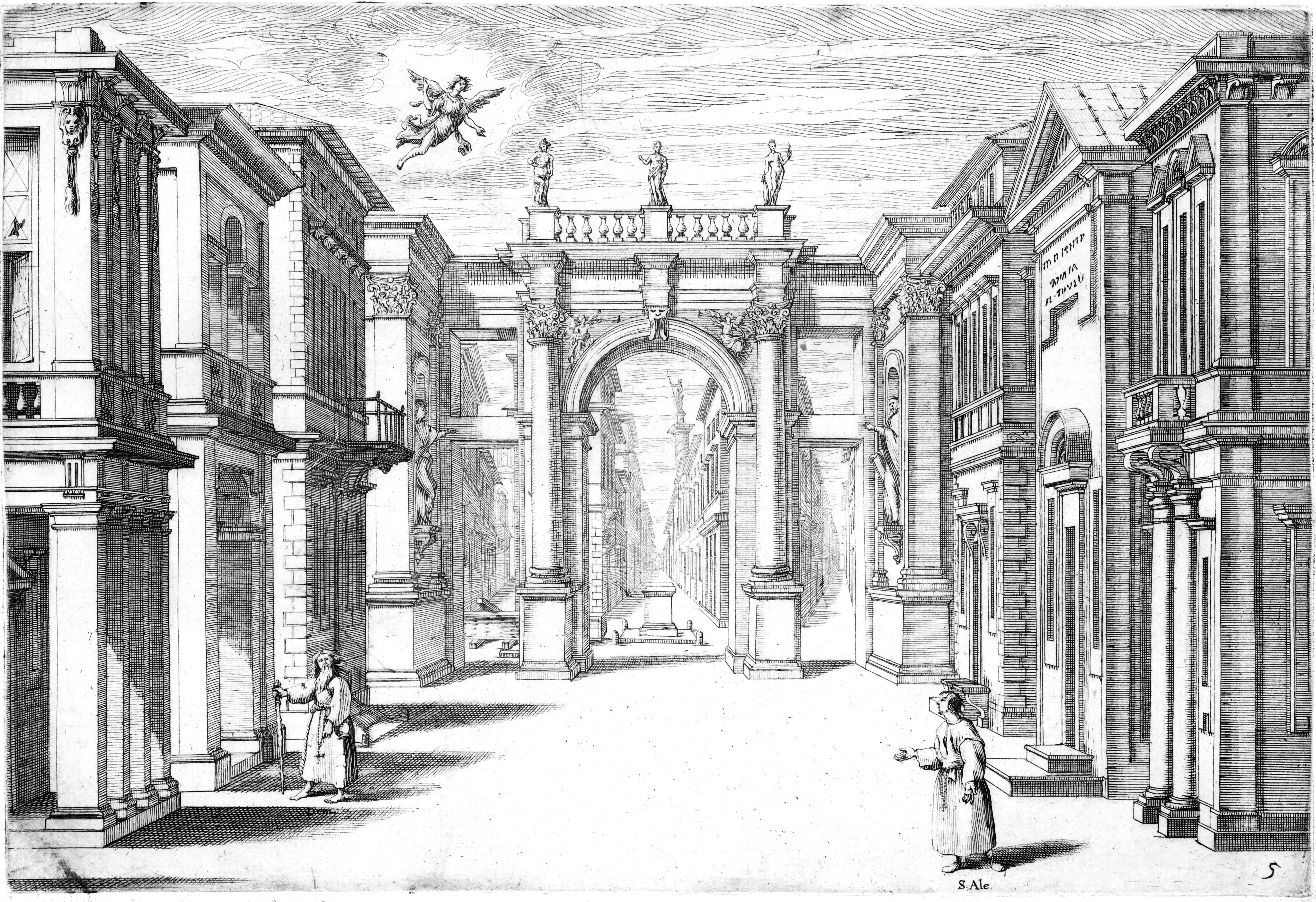 Stefano Landi - Il Sant'Alessio - Rome 1634 - Plate 5 without proscenium